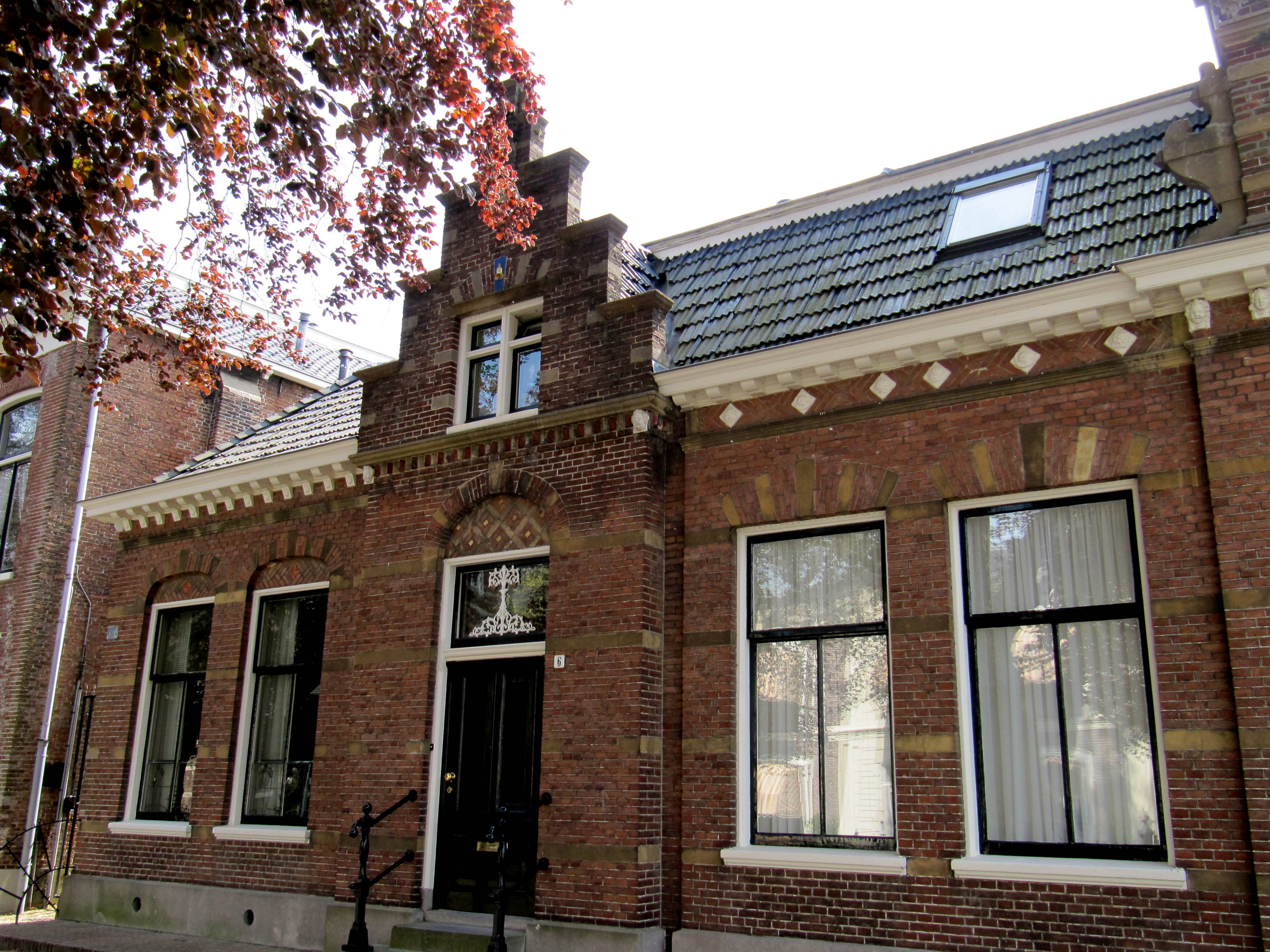 Hardstenen plint en trapstoep. Metselwerk van roodbruine baksteen verrijkt met allerlei elementen van kunststeen: dorpel- en tussenbanden, neggen en versieringen bij de trapgeveltop. Deur met bovenlicht otlast met rondboog in eenzelfde decoratieve aanpak. De gevel van het toegangsrisaliet bekroond met een fries van overhoeks geplaatste grijze en rode stenen met op de hoeken overhoeks geplaatste consoles met kopjes. Daarop volgt de traptop met een tweeledig venstertje en gevelsteen met het beeldmerk van het gasthuis: de bel. Afdekplaten, pinakel met sieranker, kleine klauwstukken en bal ter bekroning.